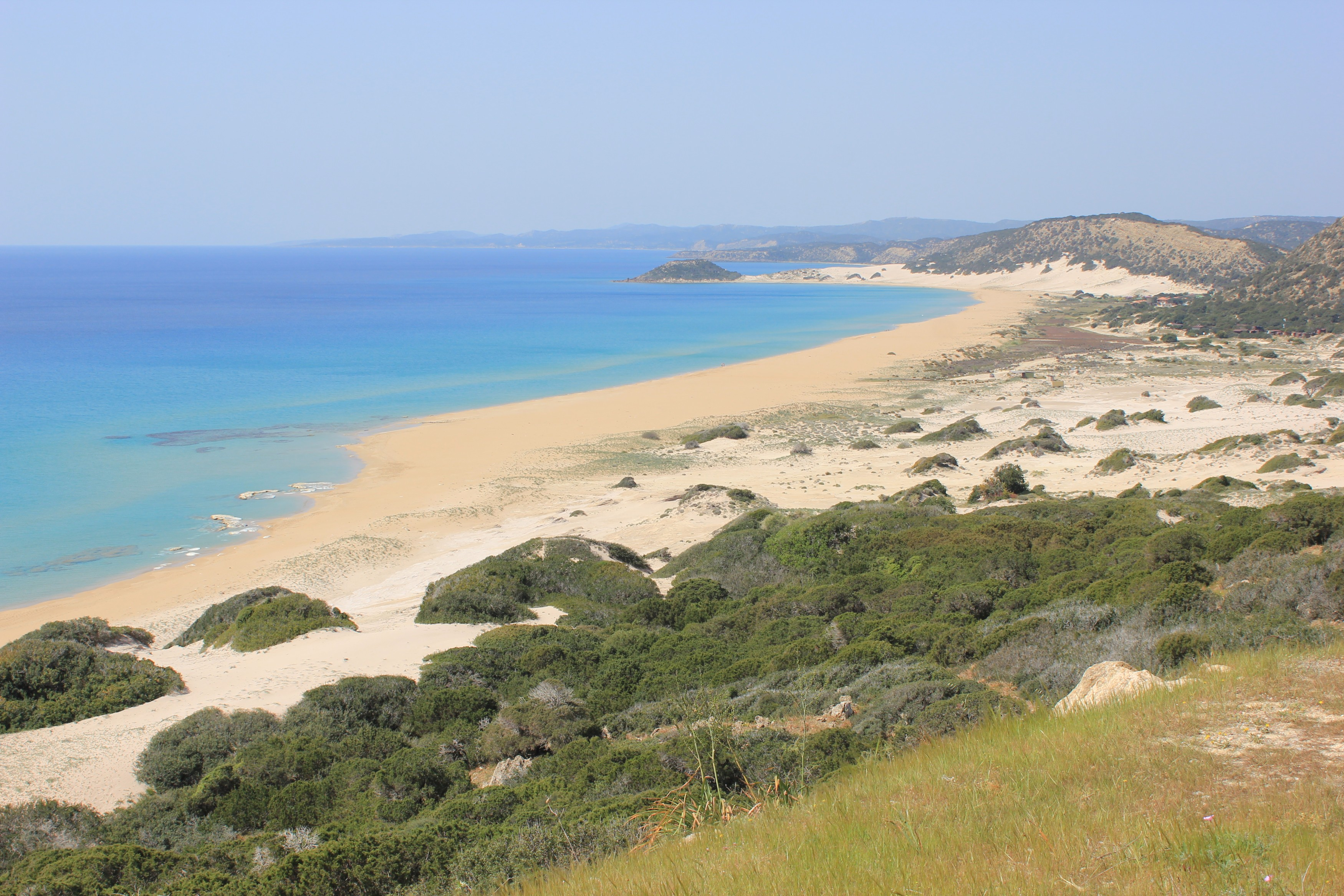 Küste auf der Karpashalbinsel, Nordzypern.